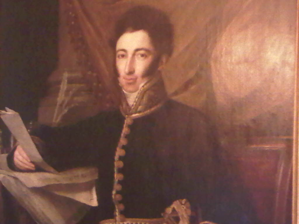 Retrato del aristócrata y político español José María Moscoso de Altamira (1788-1855), primer conde de Fontao. Durante el reinado de Isabel II de España llegó a ser ministro de Gobernación de la Península y de Fomento General del Reino y también presidente de las Cortes y primer presidente del Senado.